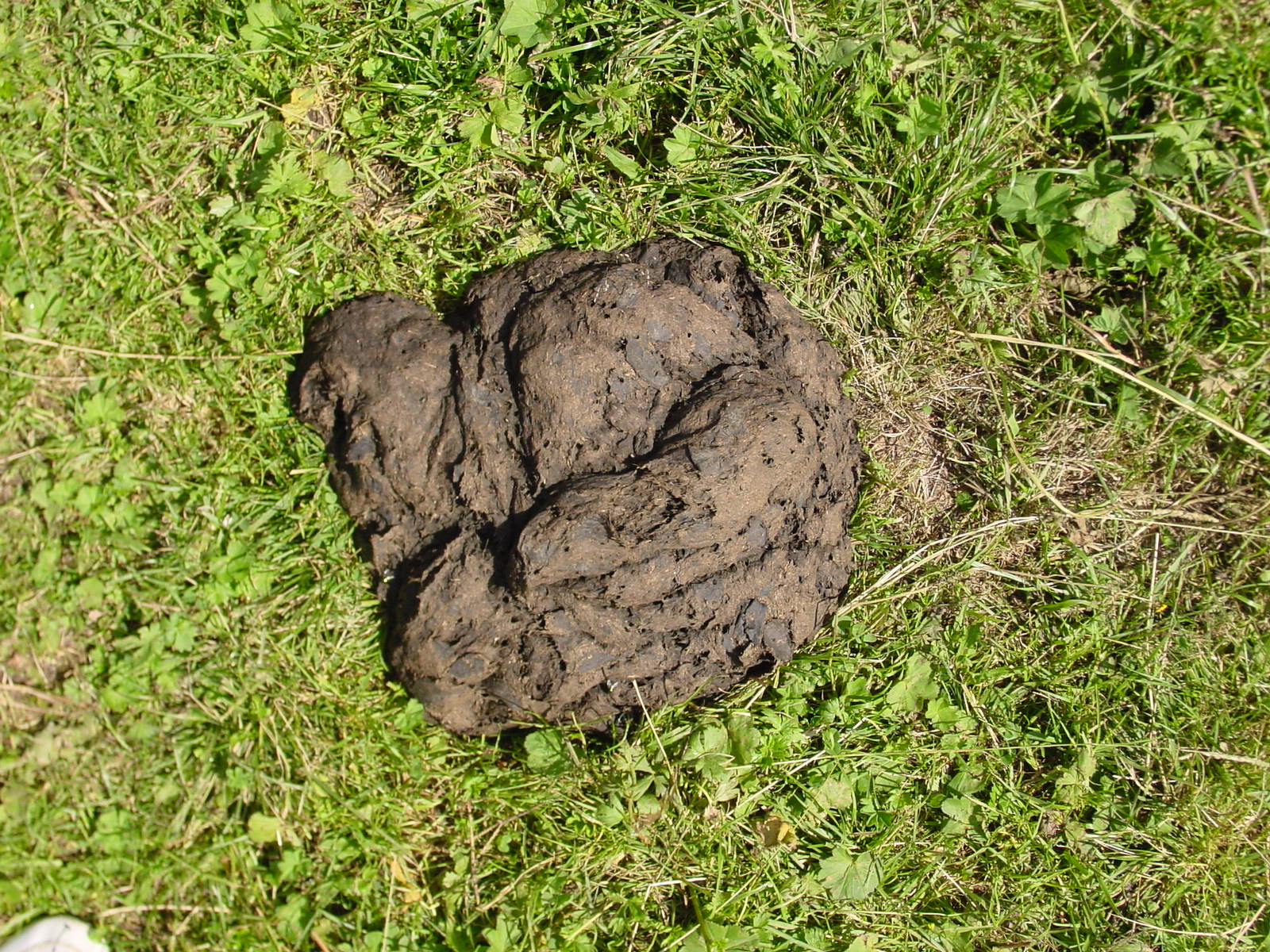 a (Kuhfladen) cow dung